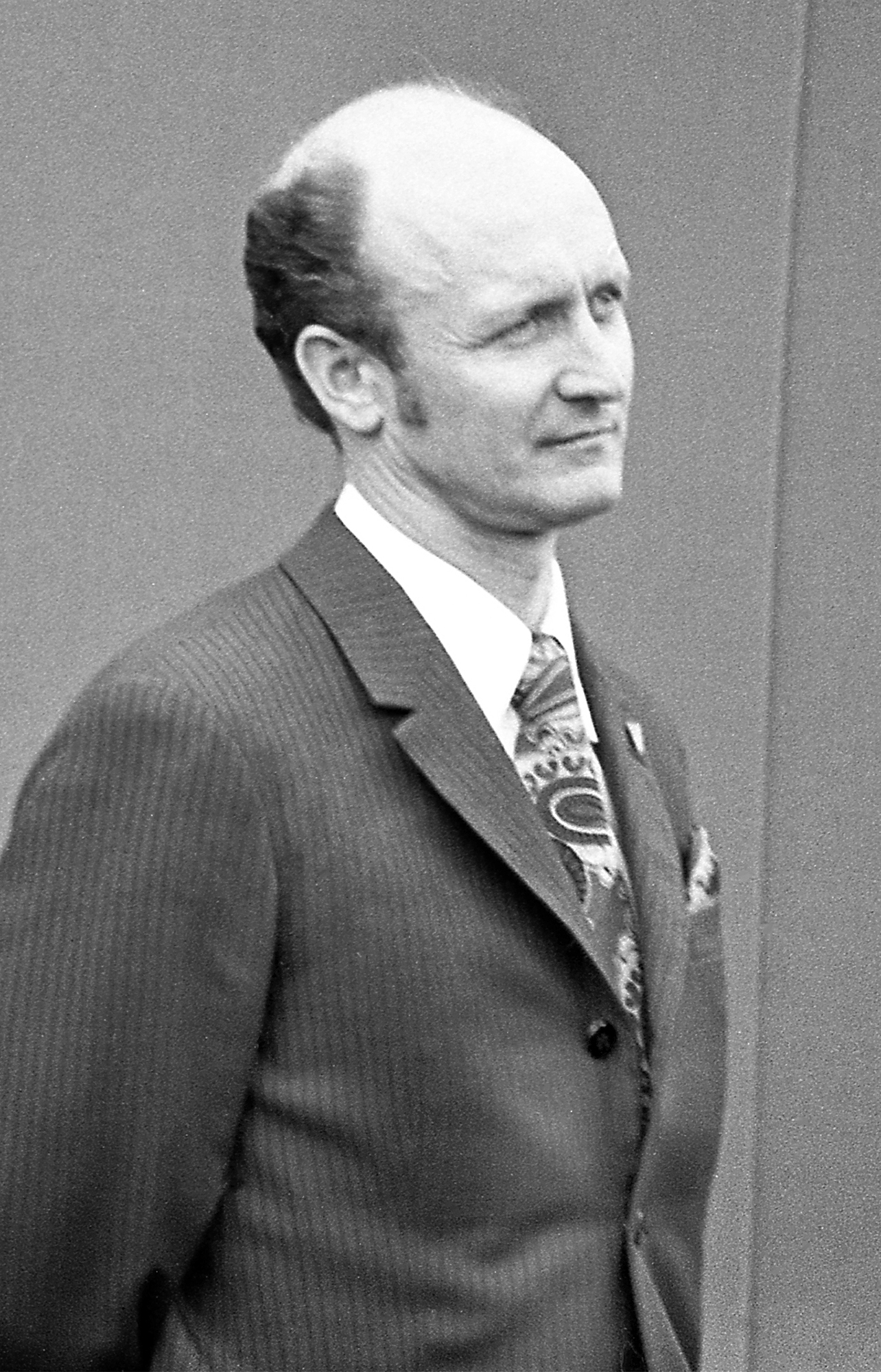 Mati Klooren